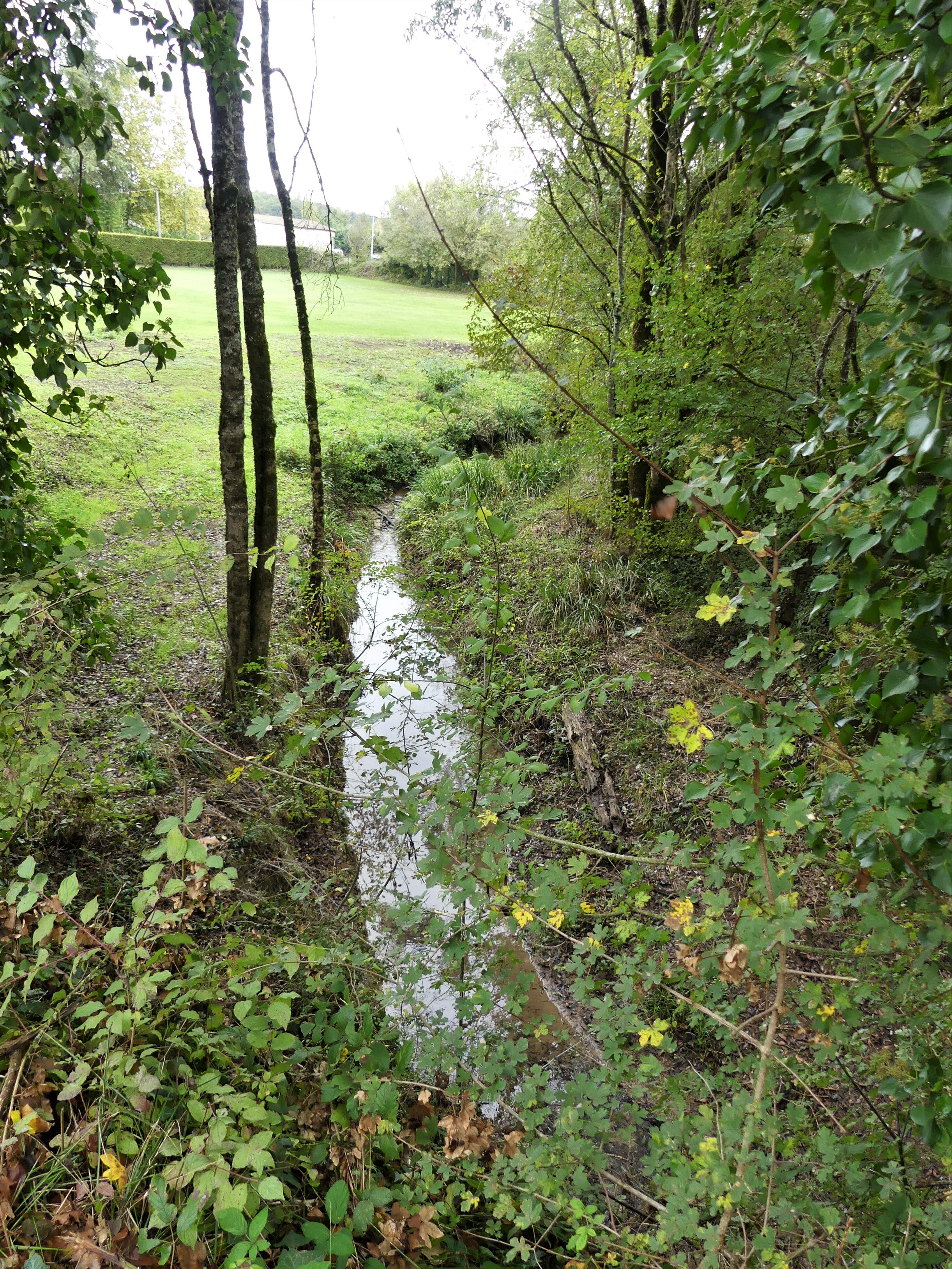 L'Escourou au sud du lieu-dit Lestang en limite des communes de Sainte-Innocence (à gauche) et Fonroque (à droite), Dordogne, France. Vue prise en direction de l'amont.